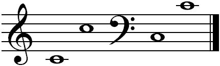 Nuty c na pięciolinii.